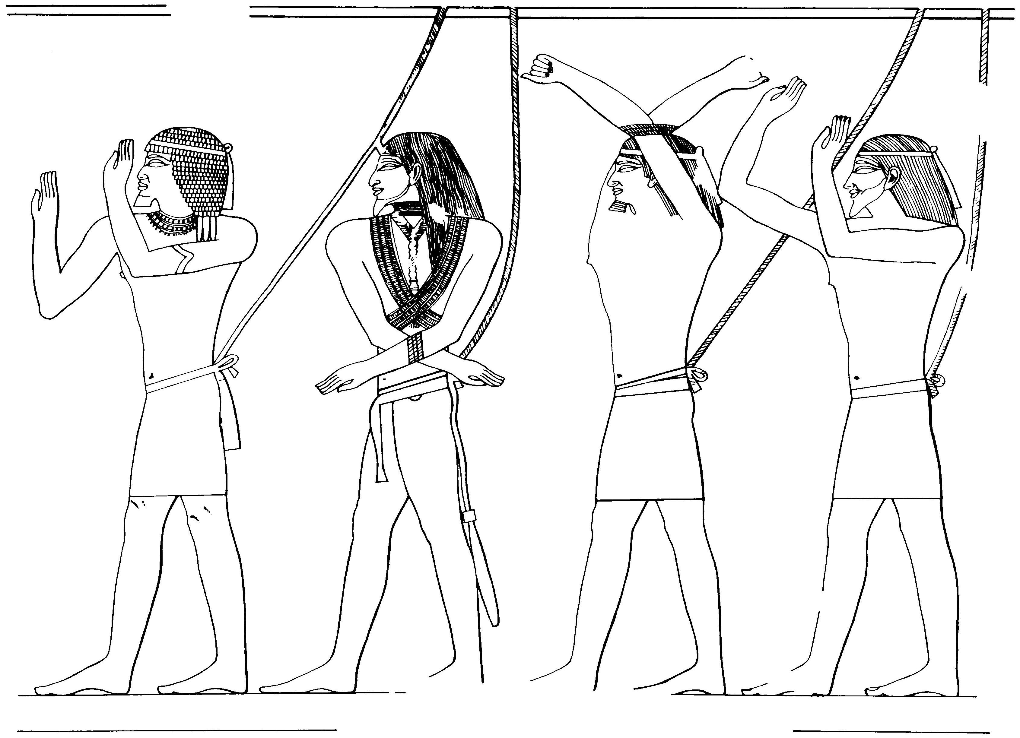 Zajatí nepřátelé; reliéf z Sahureova zádušního chrámu